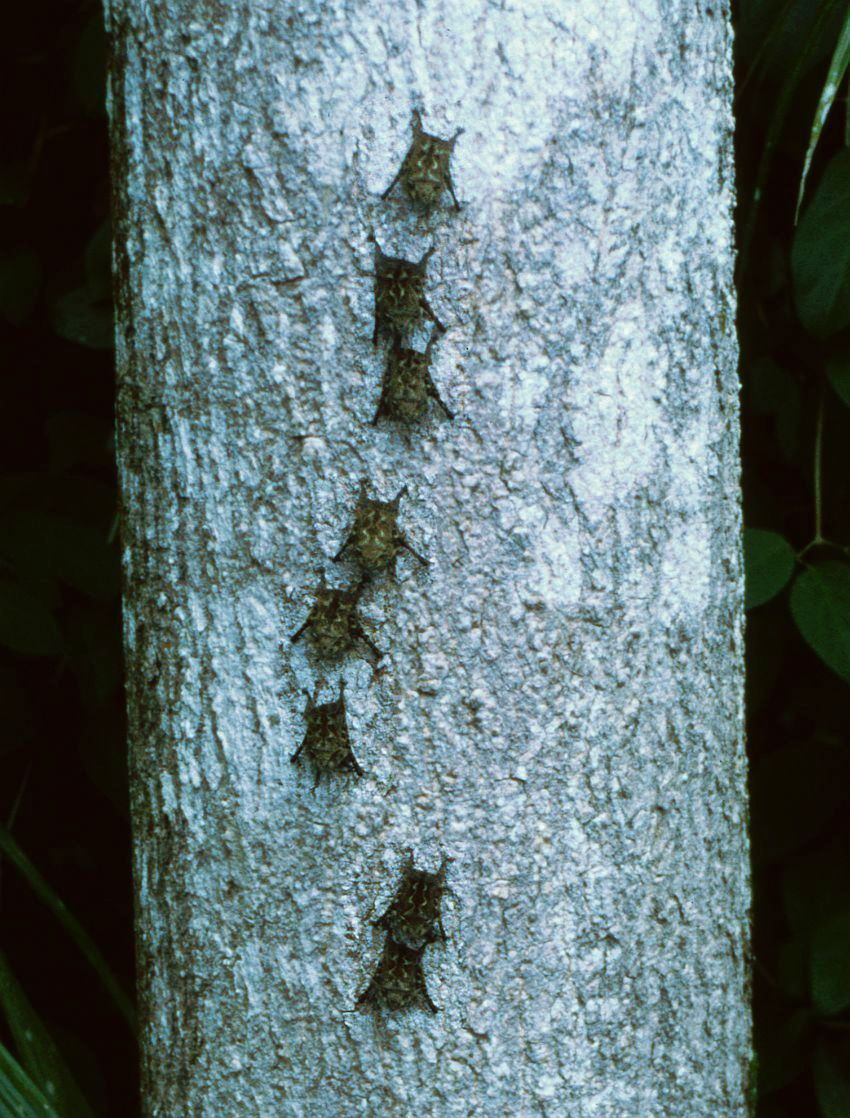 Rhynchonycteris naso, Emballonuridae – Costa Rica: Prov. Alajuela, Río Frío SSW Los Chiles (Refugio Nacional de Vida Silvestre Caño Negro)